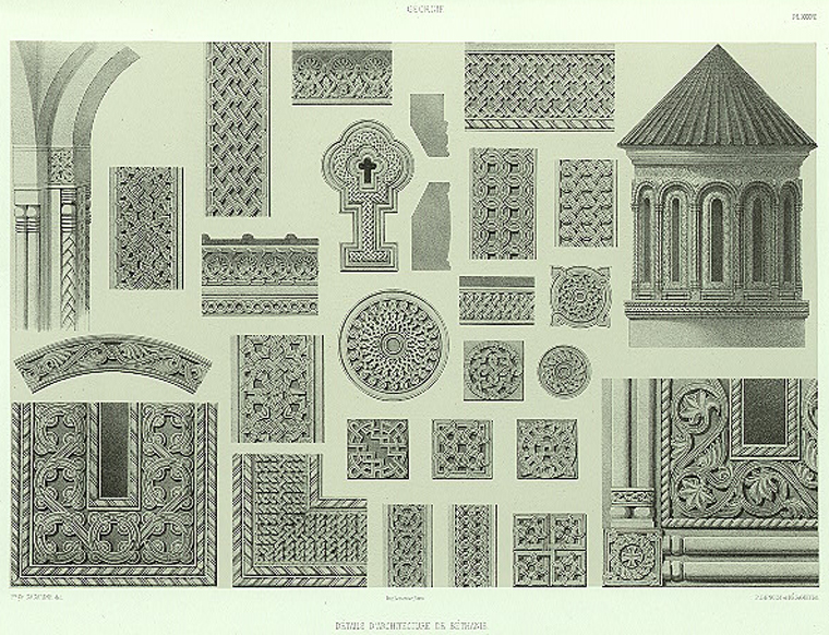 Georgie. Details d'architecture de Bethanie.